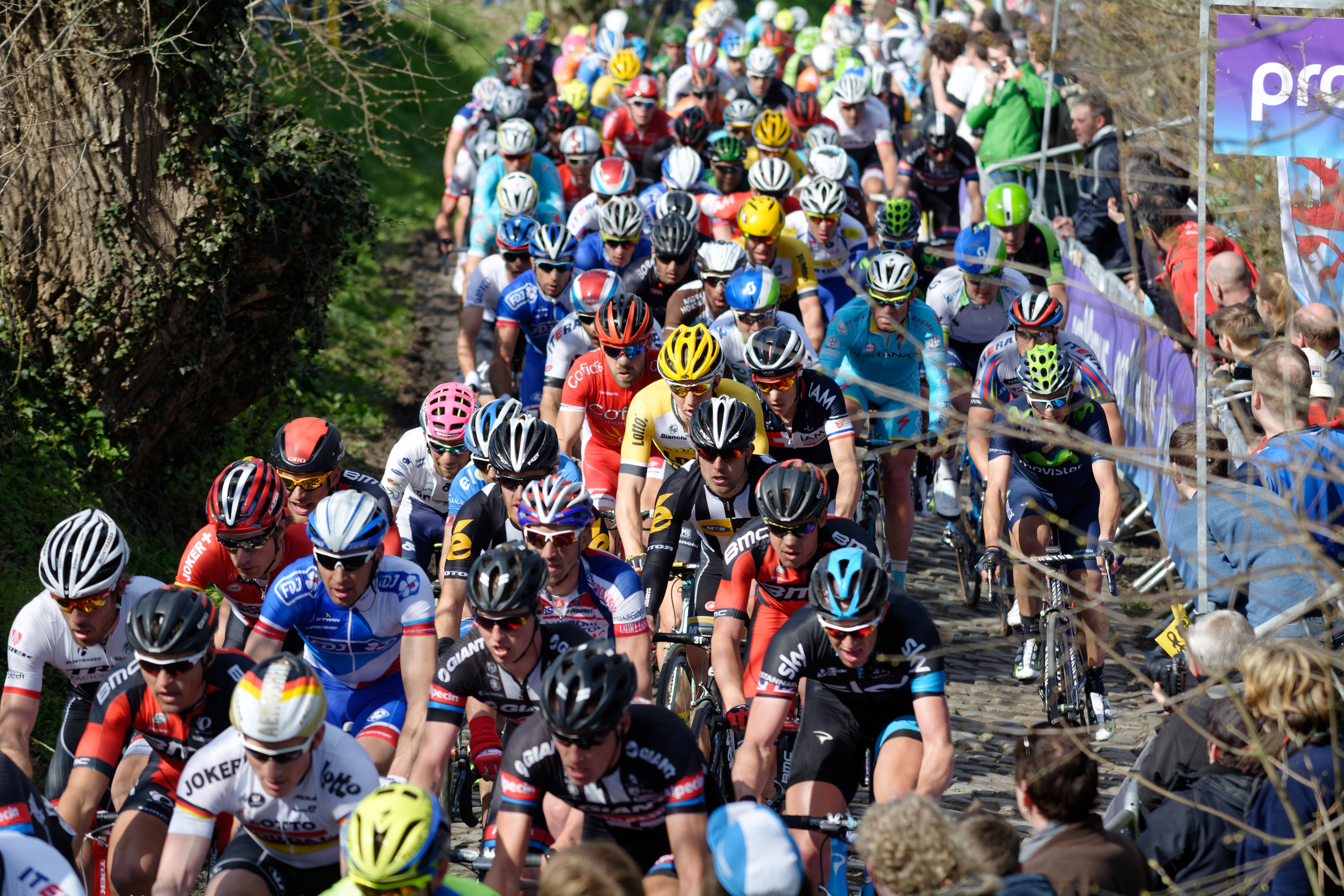 D71_6619_DxO